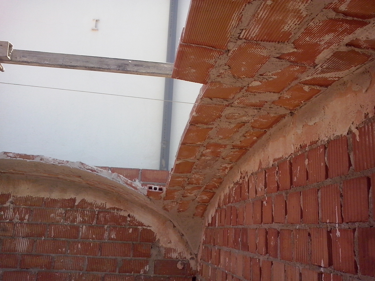 Ejecucion boveda tabicada de arista